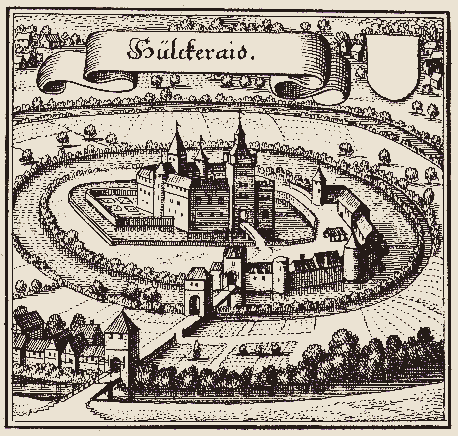 Hülchrath, alter Stich